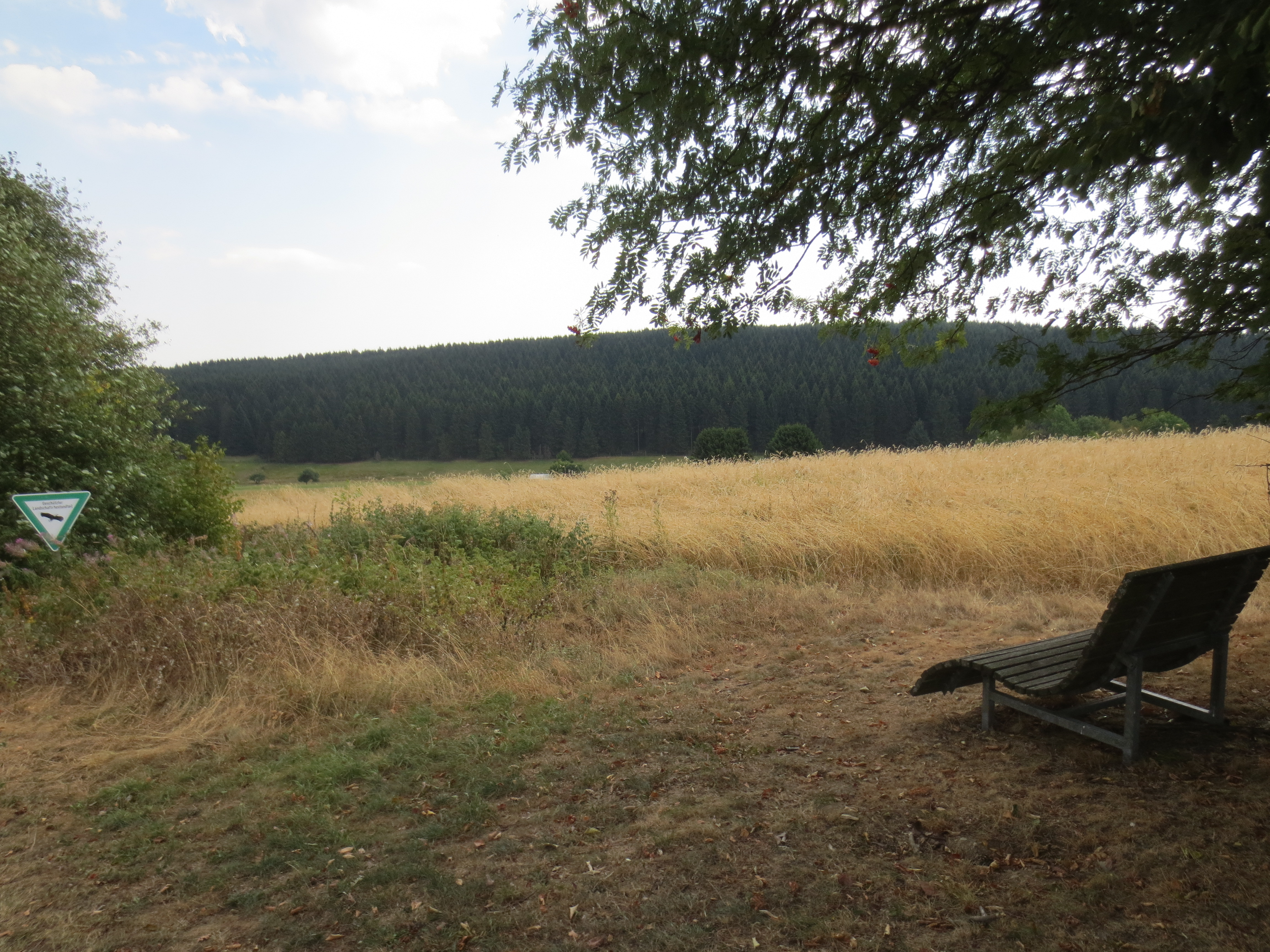 Blick auf den Berg "Aukopf" von der Kohlenstraße, oberhalb Benfe (Waldheim)